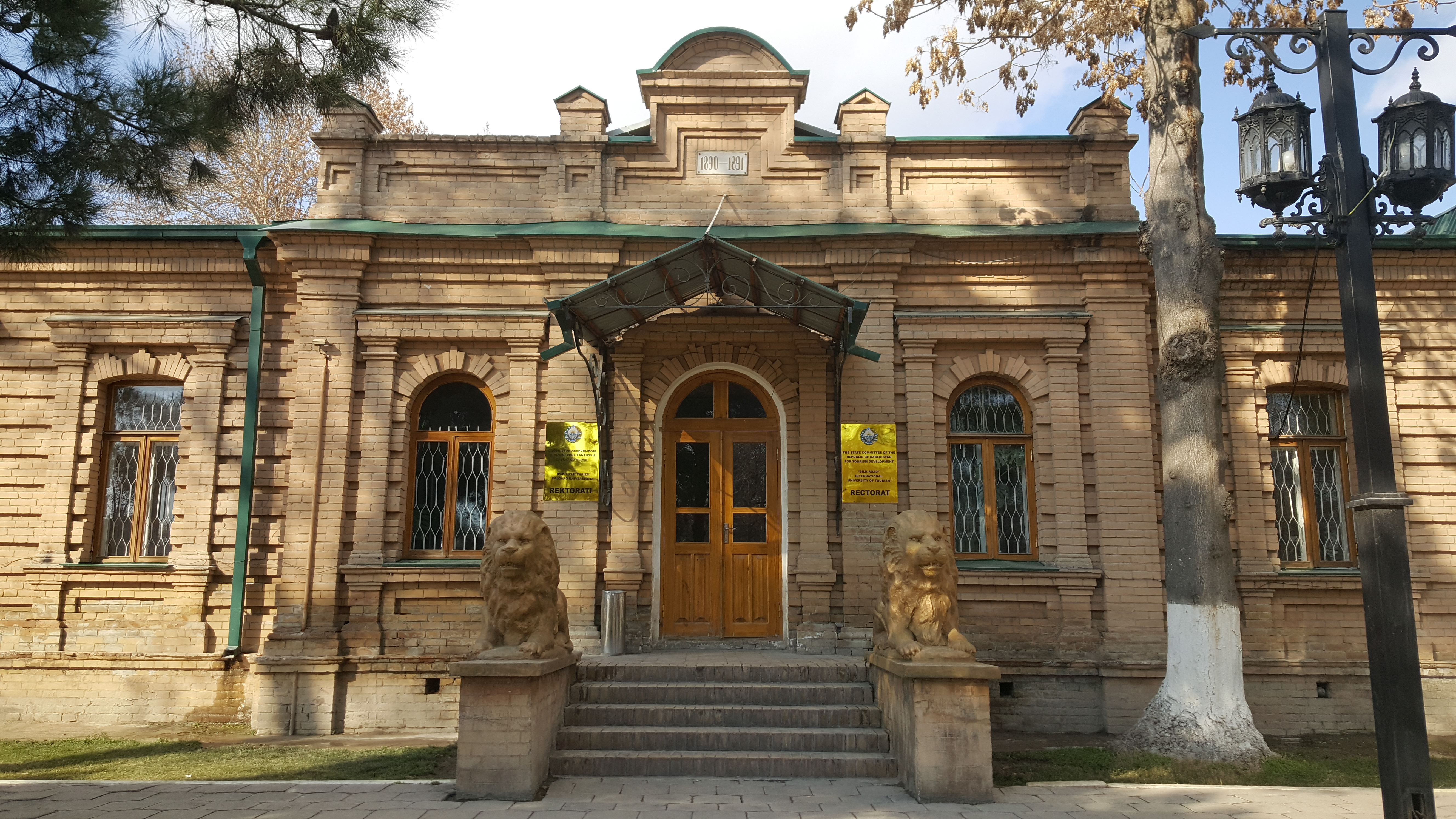 Ректорат